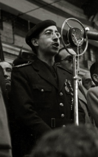 Título original: Llegada de integrantes de la División Azul a la estación del Norte (26/40) Localización: San Sebastián (Guipúzcoa)